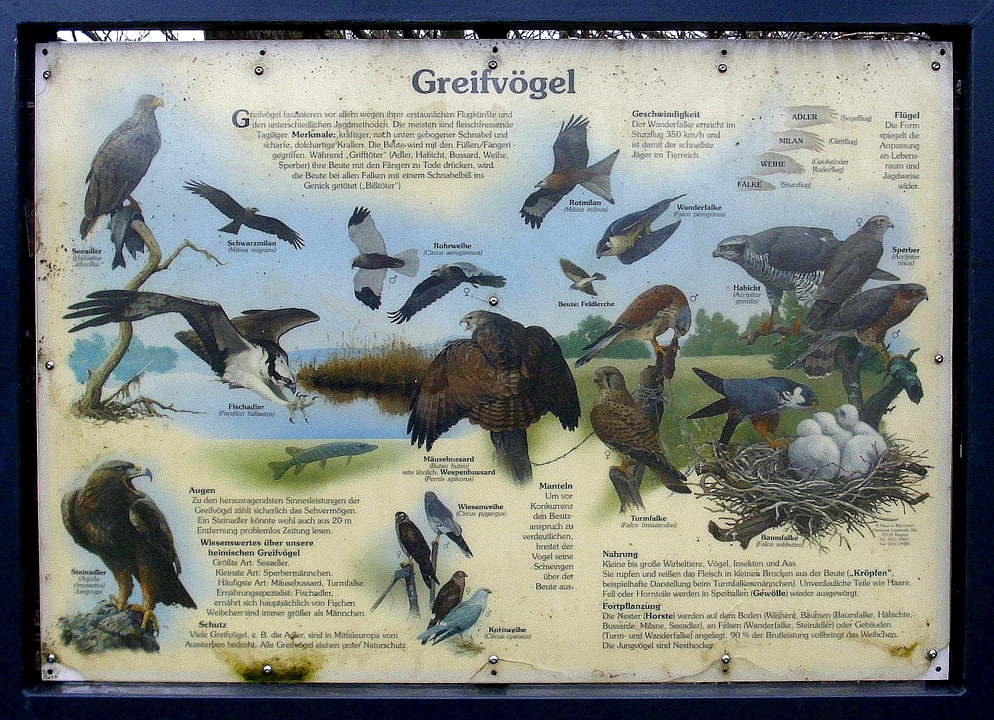 Schautafel zu verschiedenen Greifvögeln in Deutschland/Mitteleuropa, aufgestellt im Naturschutzgebiet Conventer See in Börgerende-Rethwisch nahe Heiligendamm/Bad Doberan